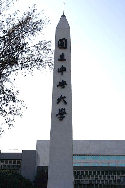 桃園県にある国立中央大学